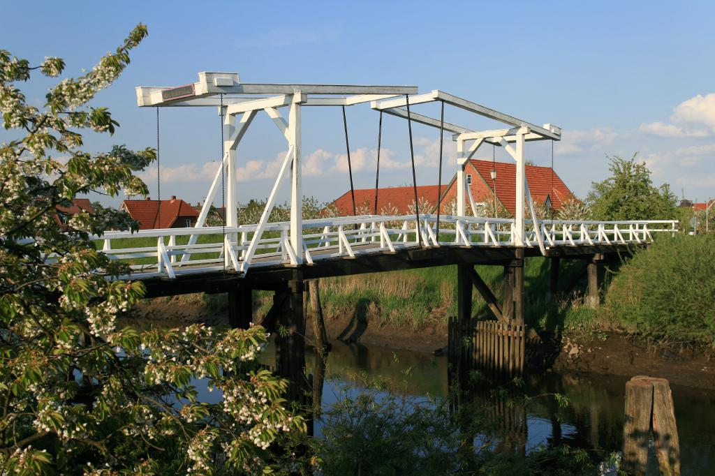 Hogendiekbrücke